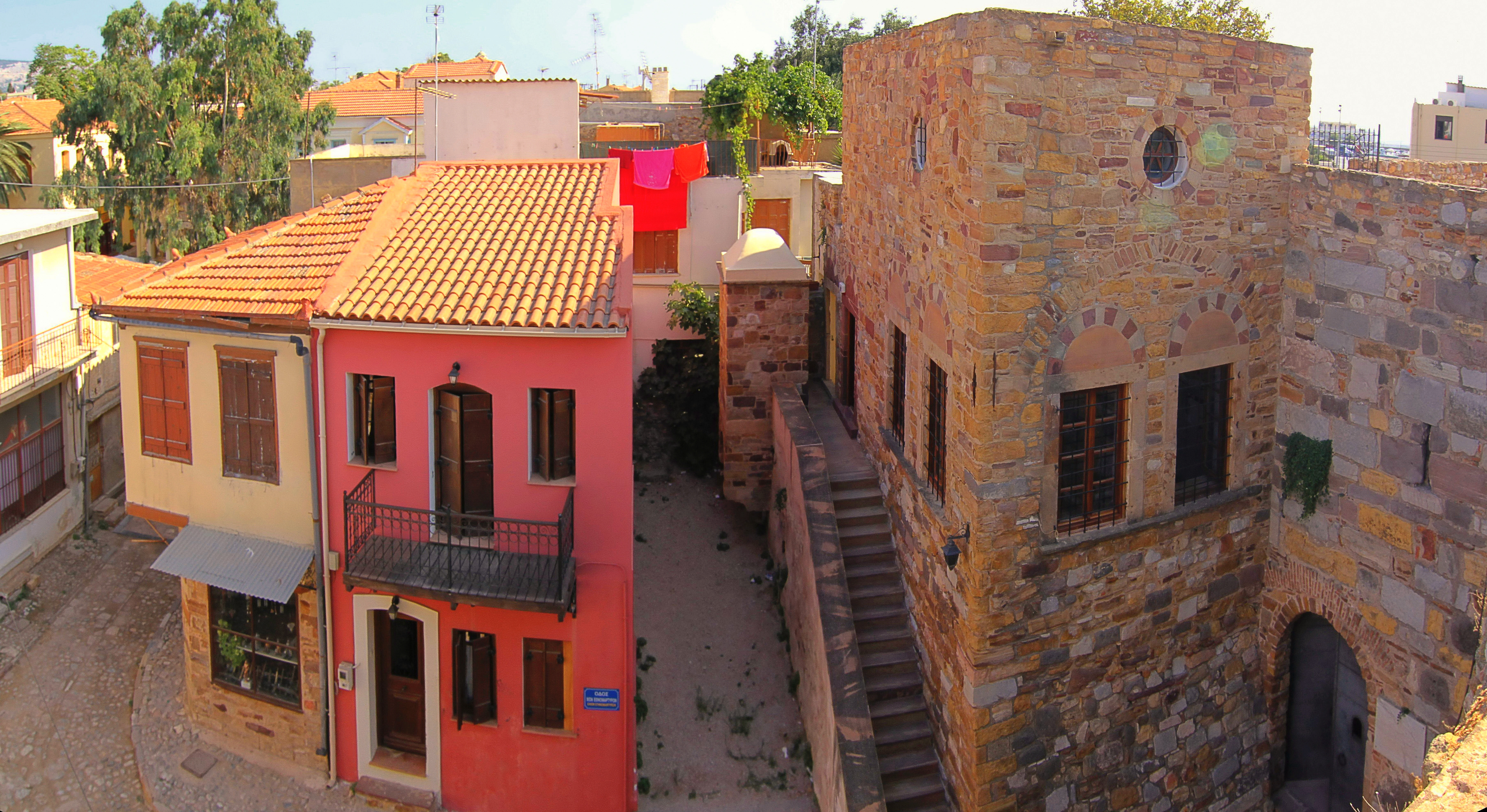 Κάστρο Χίου«Κάστρο Χίου»